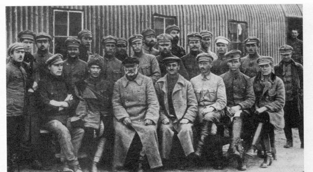 Руководство Украинской Галицкой армии The factual accuracy of this description or the file name is disputed.Reason: в составе войск Новороссии Вооруженных сил Юга России, март 1920 г. Посредине-бывший командир Мирон Тарнавский. ЦГКАФУ